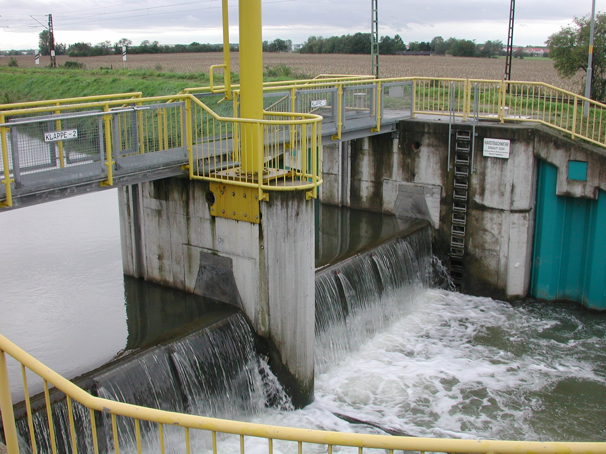 Das Hardtbachwehr zwischen Walldorf und Nußloch zweigt den Hardtbach vom Leimbach ab.